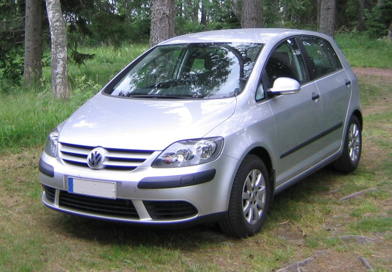 Volkswagen Golf Plus. Own work.